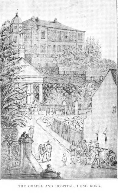 Здание миссии Лондонского миссионерского общества в Гонконге